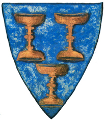 Escudo do Rei de Galiza